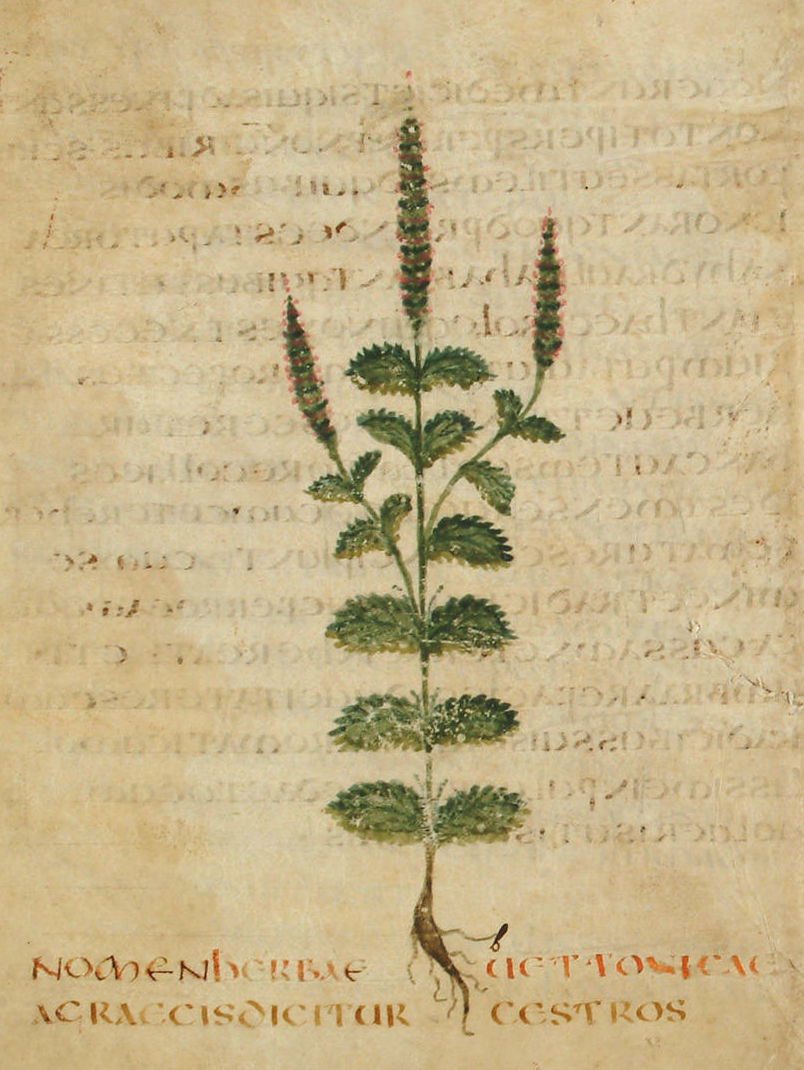 Abbildung der Betonie